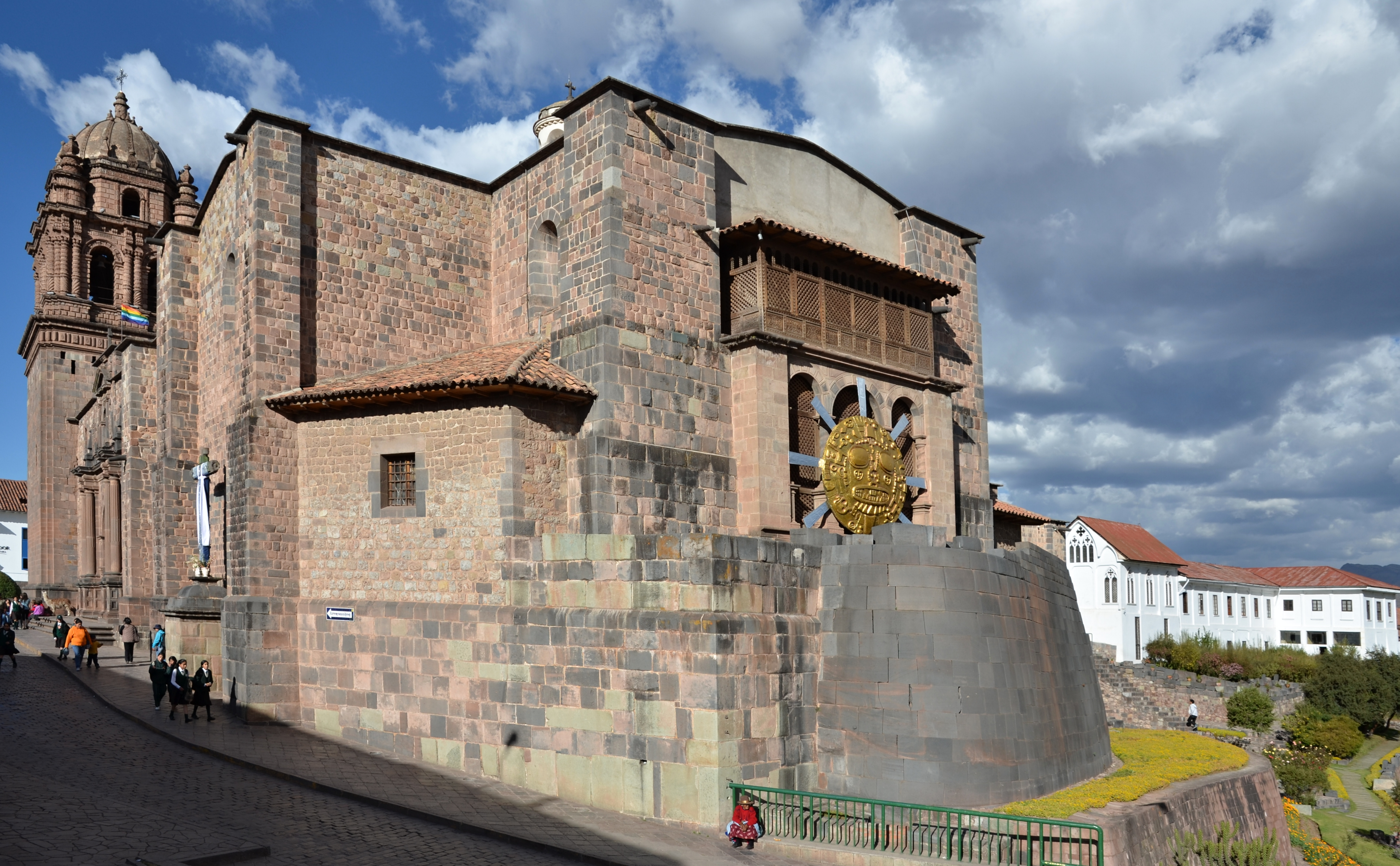 Qorikancha - Cusco